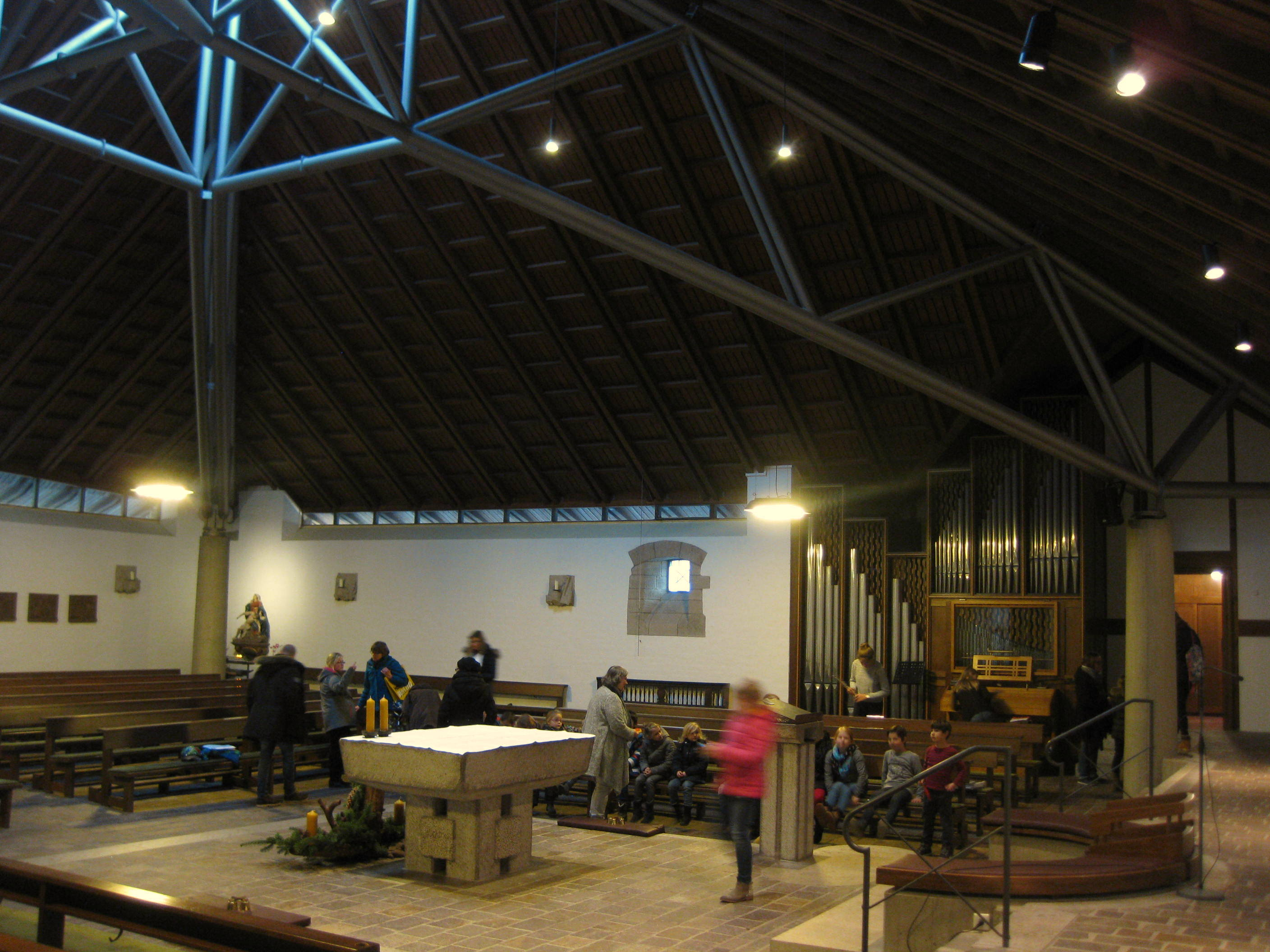 Eine Laterne im First und umlaufende Fenster belichten die quadratische Halle.